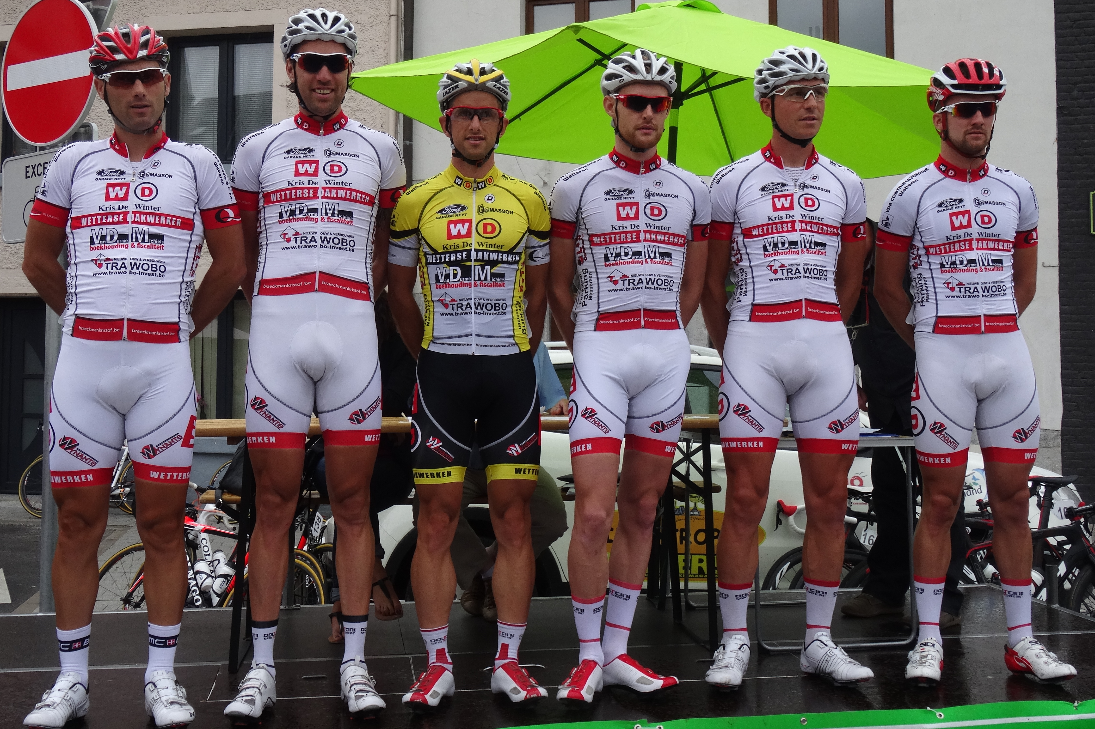 Reportage photographique réalisé le mercredi 6 août à l'occasion du départ de la première étape du Tour de la province de Namur 2014 à Jambes (Namur), Belgique.